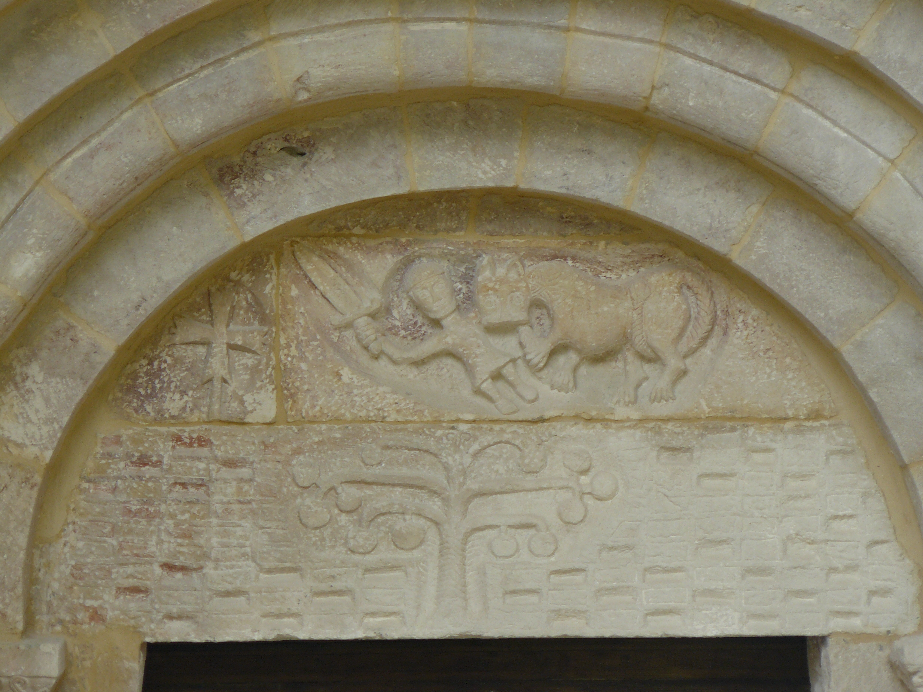 San Miguel de Cornezuelo, Burgos.